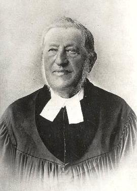 Pastor Jerzy Bogusław Heczko